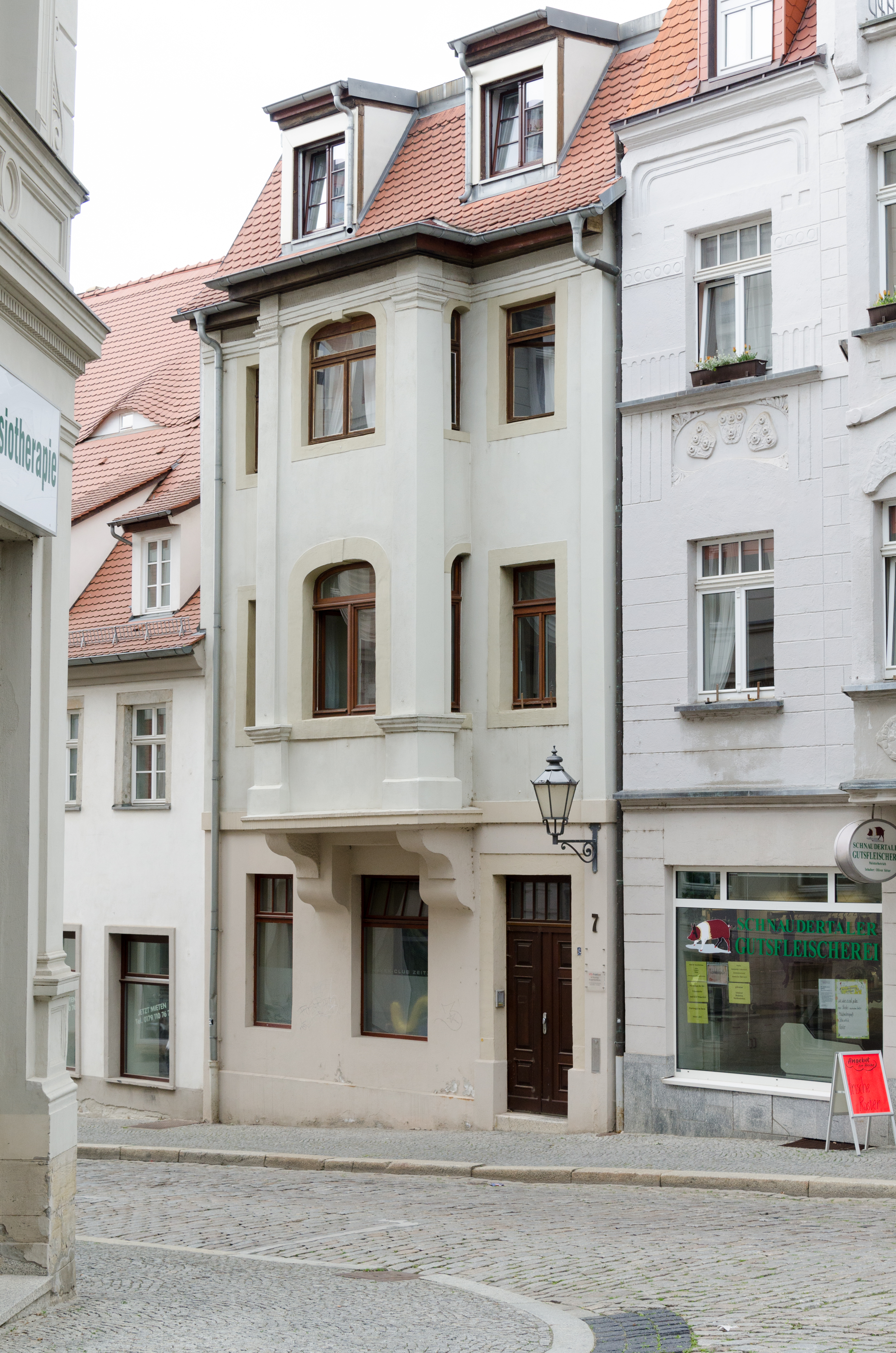 Zeitz, Brüderstraße 7